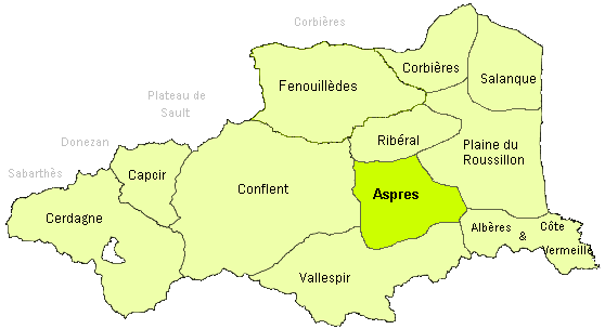 Carte des pays des PO (66) - Localisation Aspres